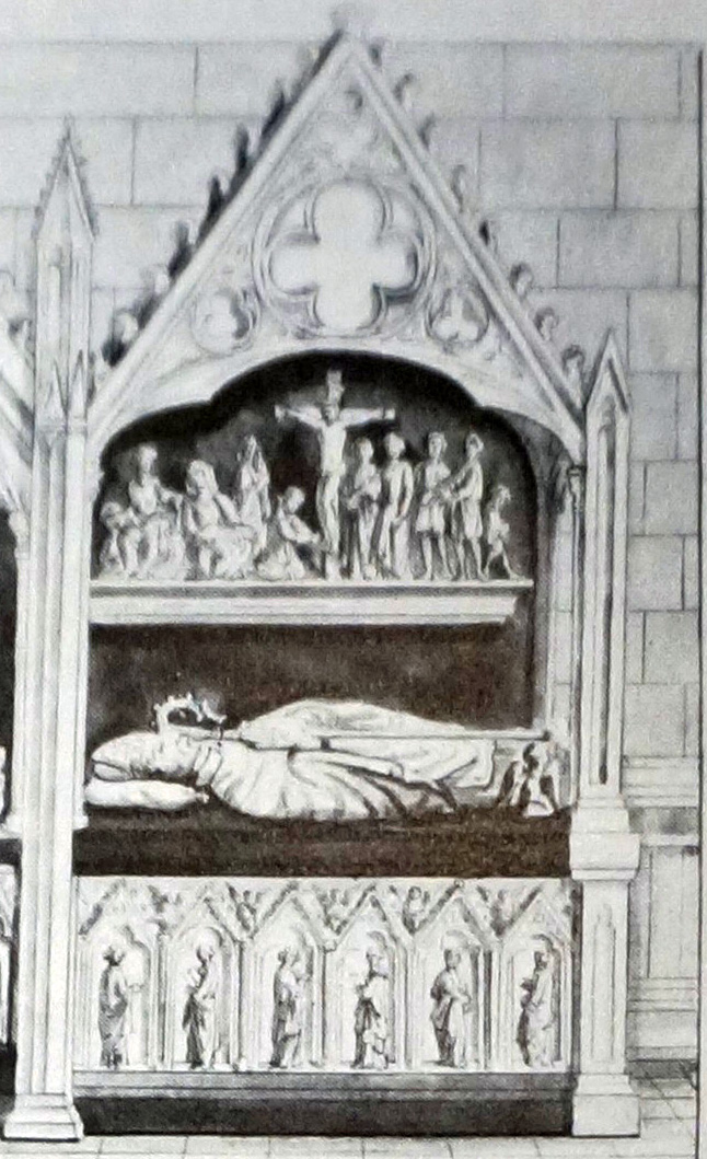 relevé fait pour Gaignières se trouvant à la BNF.